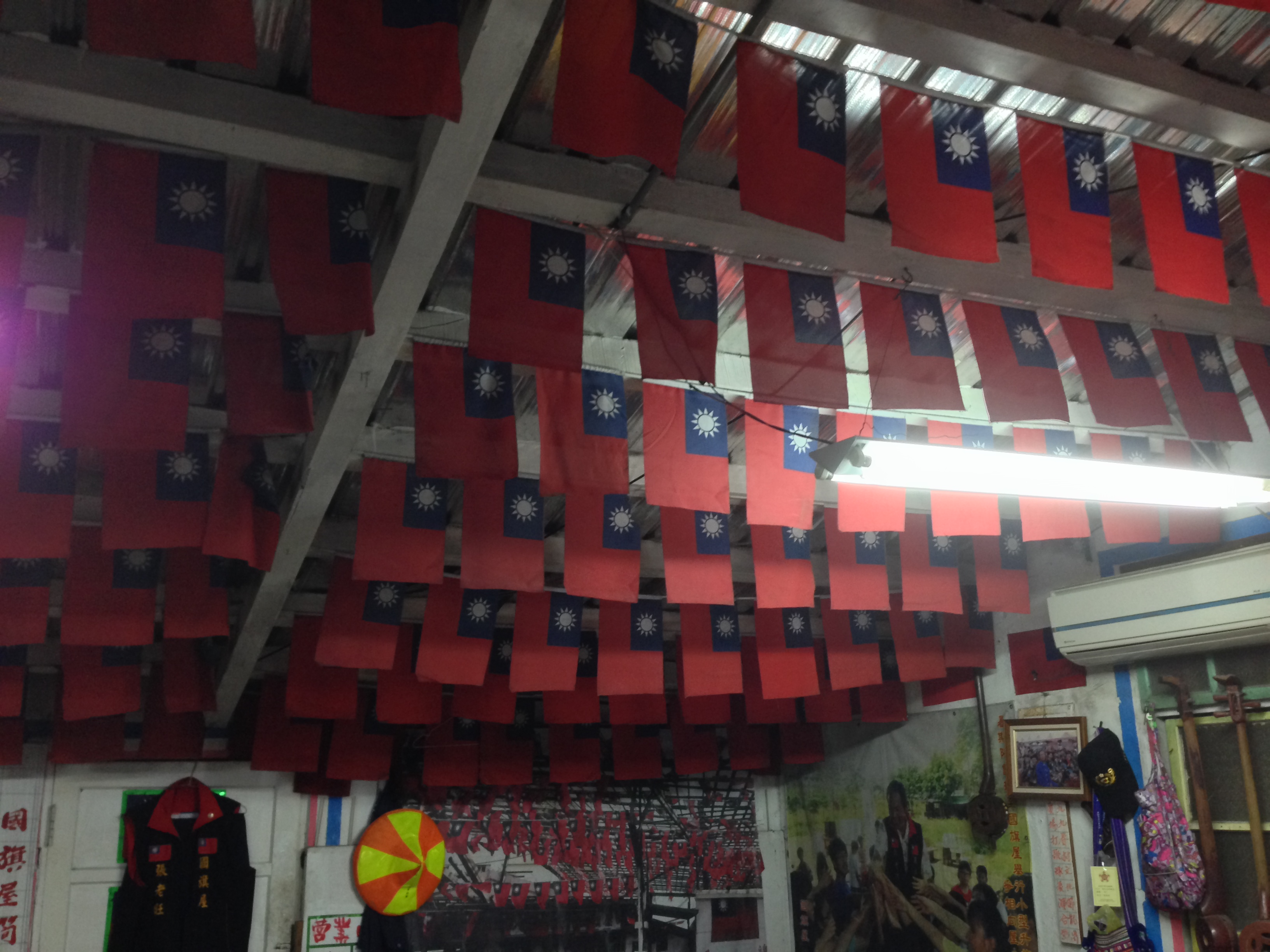 中文（台灣）: 國旗屋米干店天花板的中華民國國旗旗海。